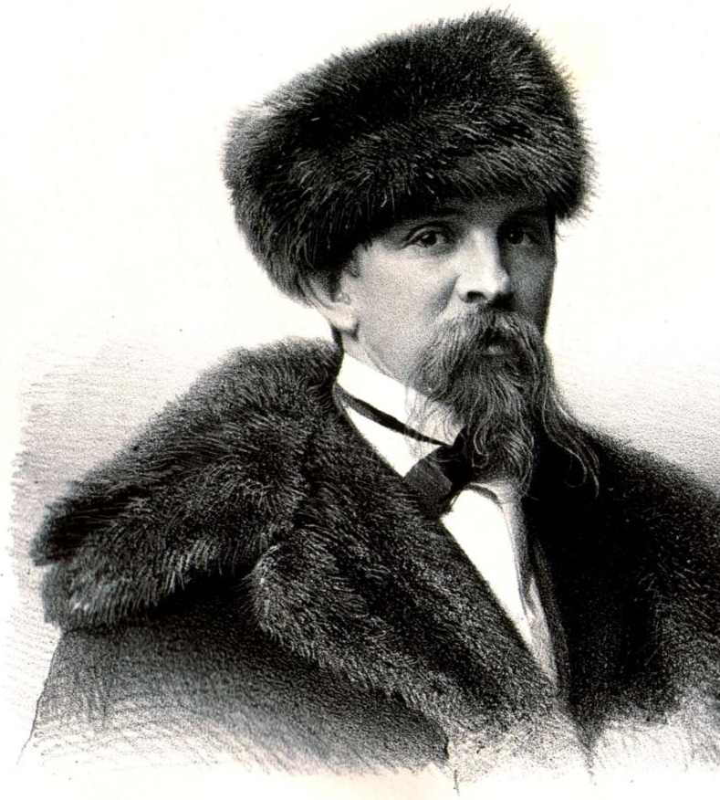 Худяков, Василий Григорьевич